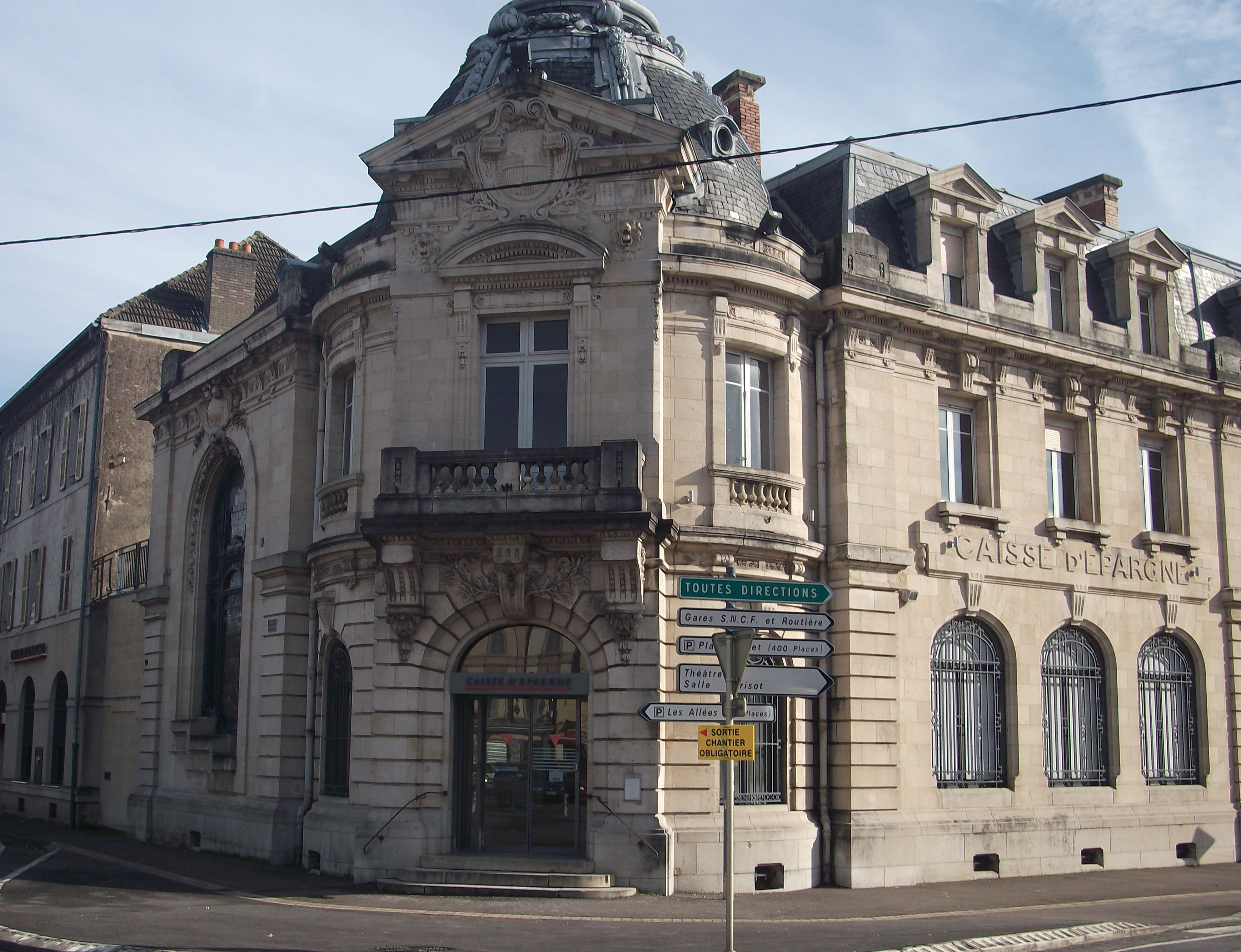 Le bâtiment de la Caisse d'Epargne de Vesoul